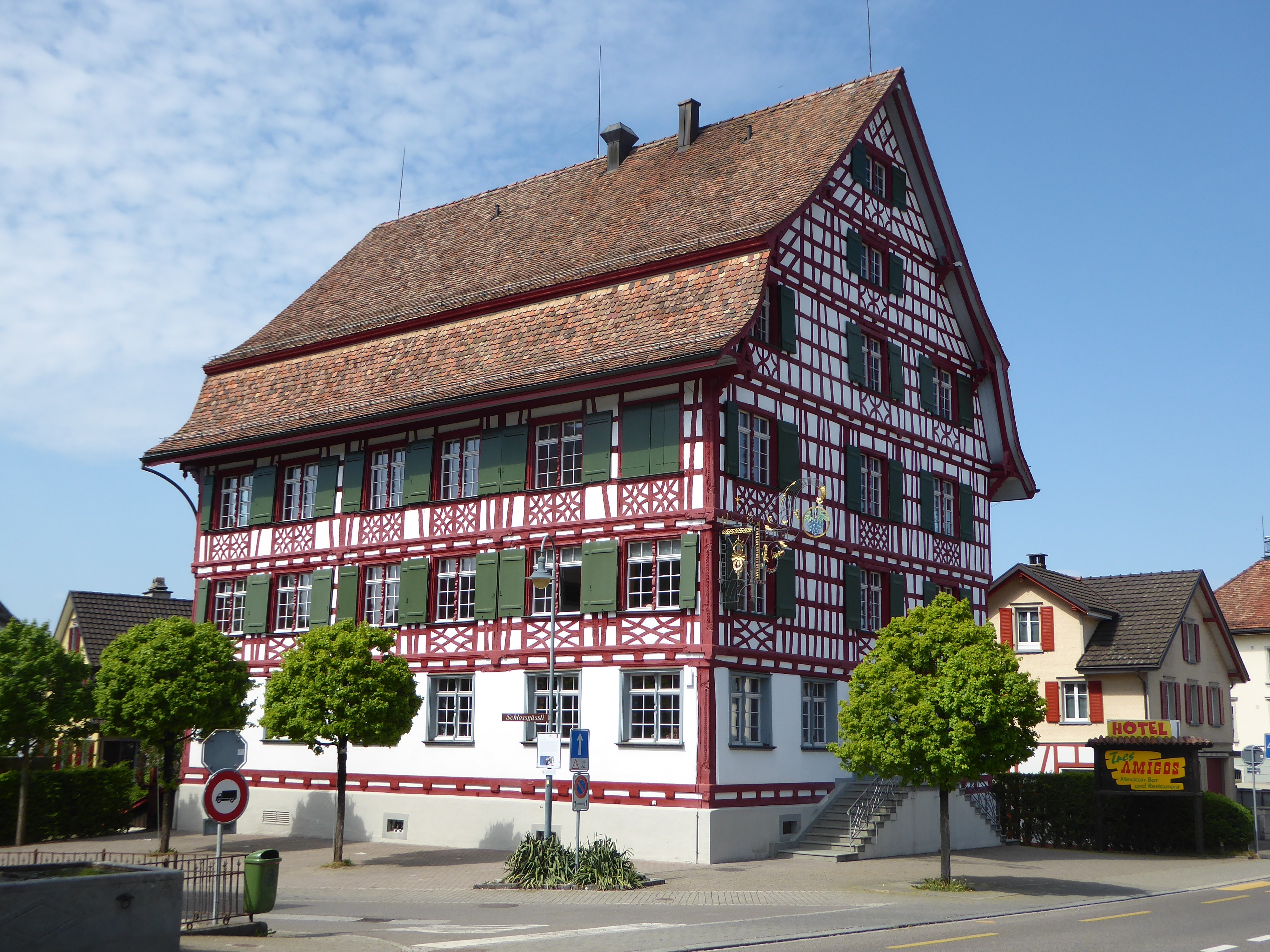 Gasthof Traube, Roggwil TG